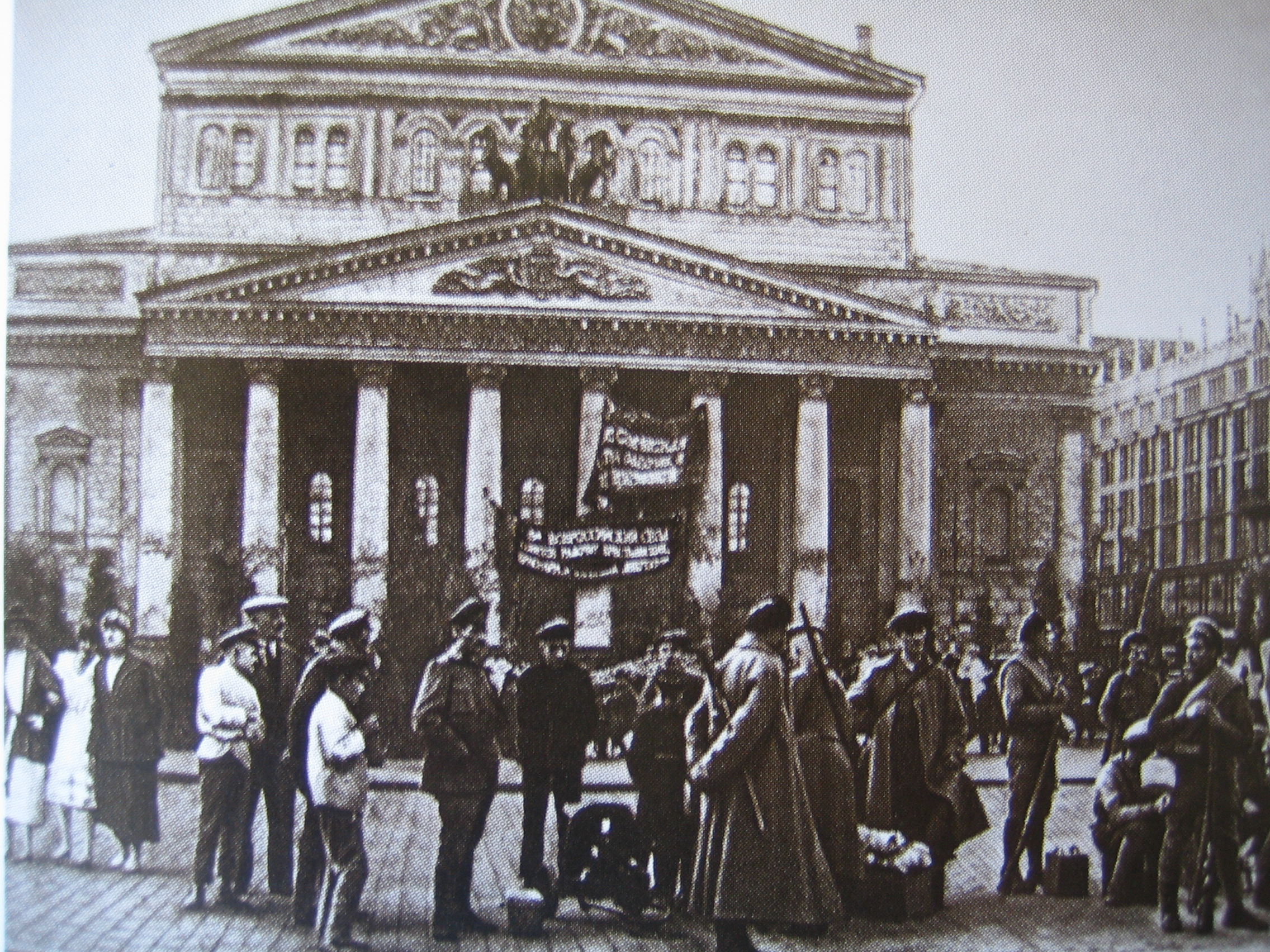 Lettische Schützen bewachen den 5. Kongress der Sowjets. Moskau, Theaterplatz vor dem Bolschoi Theater. Juli 1918.